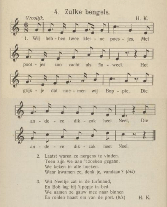 Kinderliedje van Henriëtte Kriebel (1869-1921): 'Wij hebben twee kleine poesjes / Met pootjes zo zacht als fluweel'. Met muzieknotatie. In: Voor onze kleintjes; 36 zangversjes (deel 2). Door Henriëtte Kriebel, in leven hoofd eener openbare bewaarschool te Rotterdam. 3e druk, 1923 (1e druk ca. 1905) (Noordhoff, Groningen). Blz. 7 - 8.